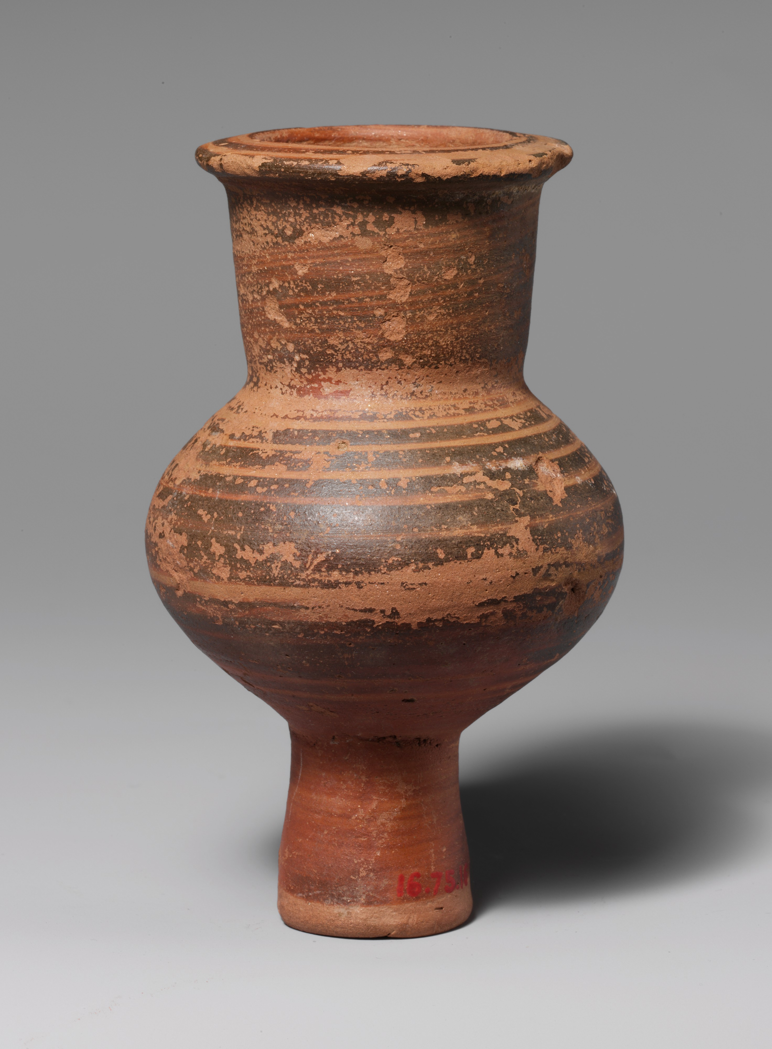 Lydian; Lydion; Vases